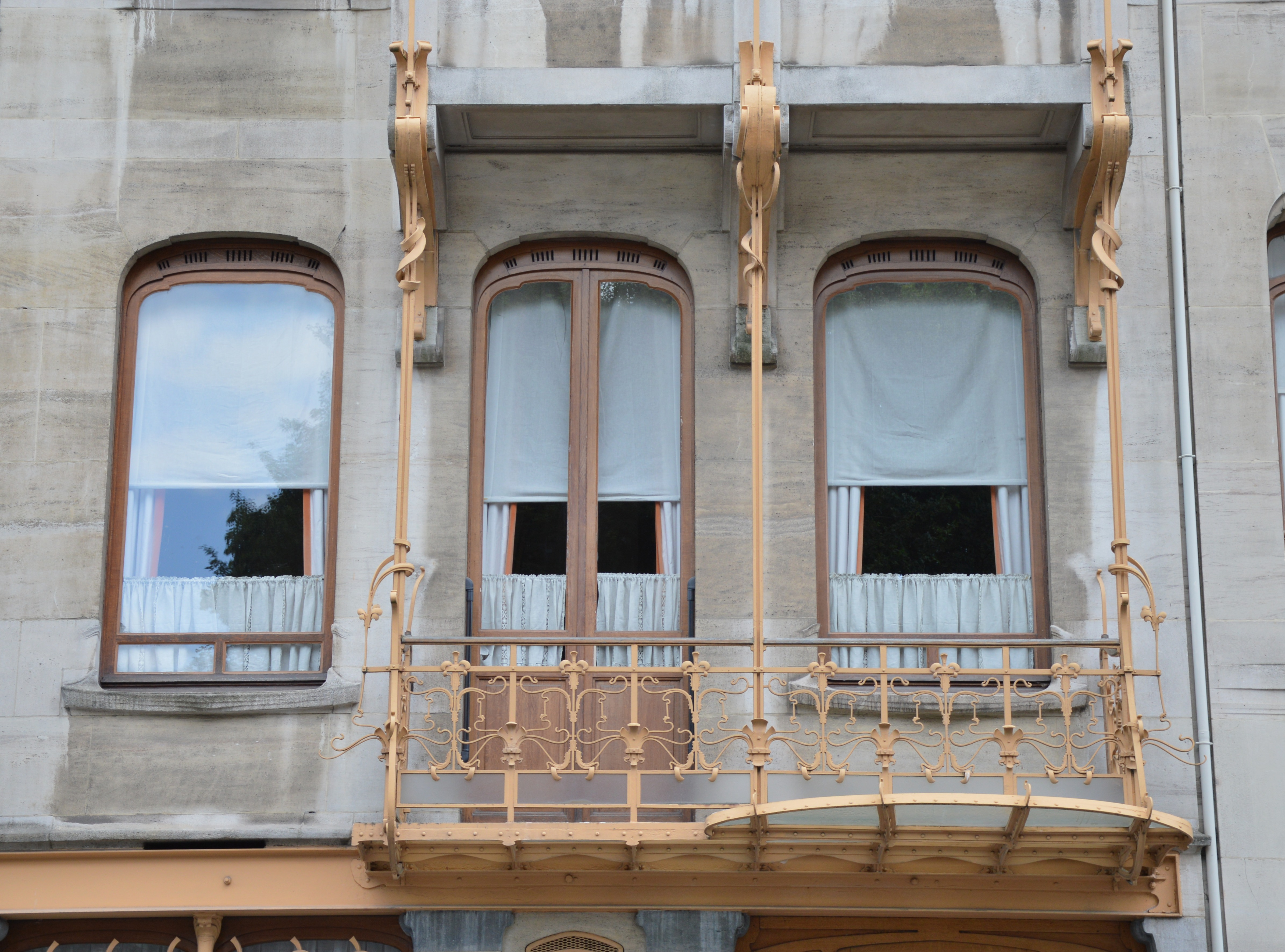 Saint-Gilles, Rue Américaine, 25